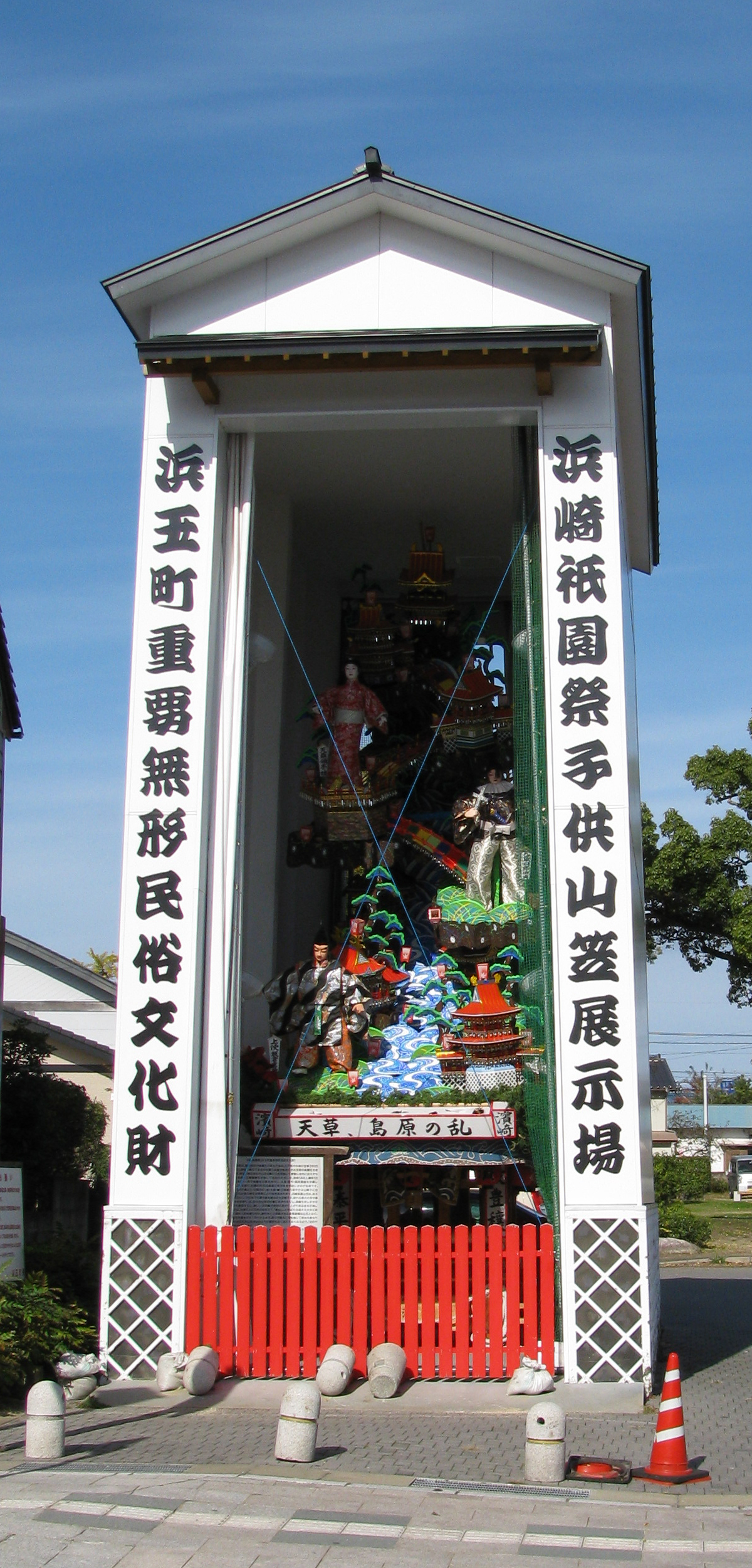 佐賀県唐津市 ひきやま公園 浜崎祇園子供山笠展示場